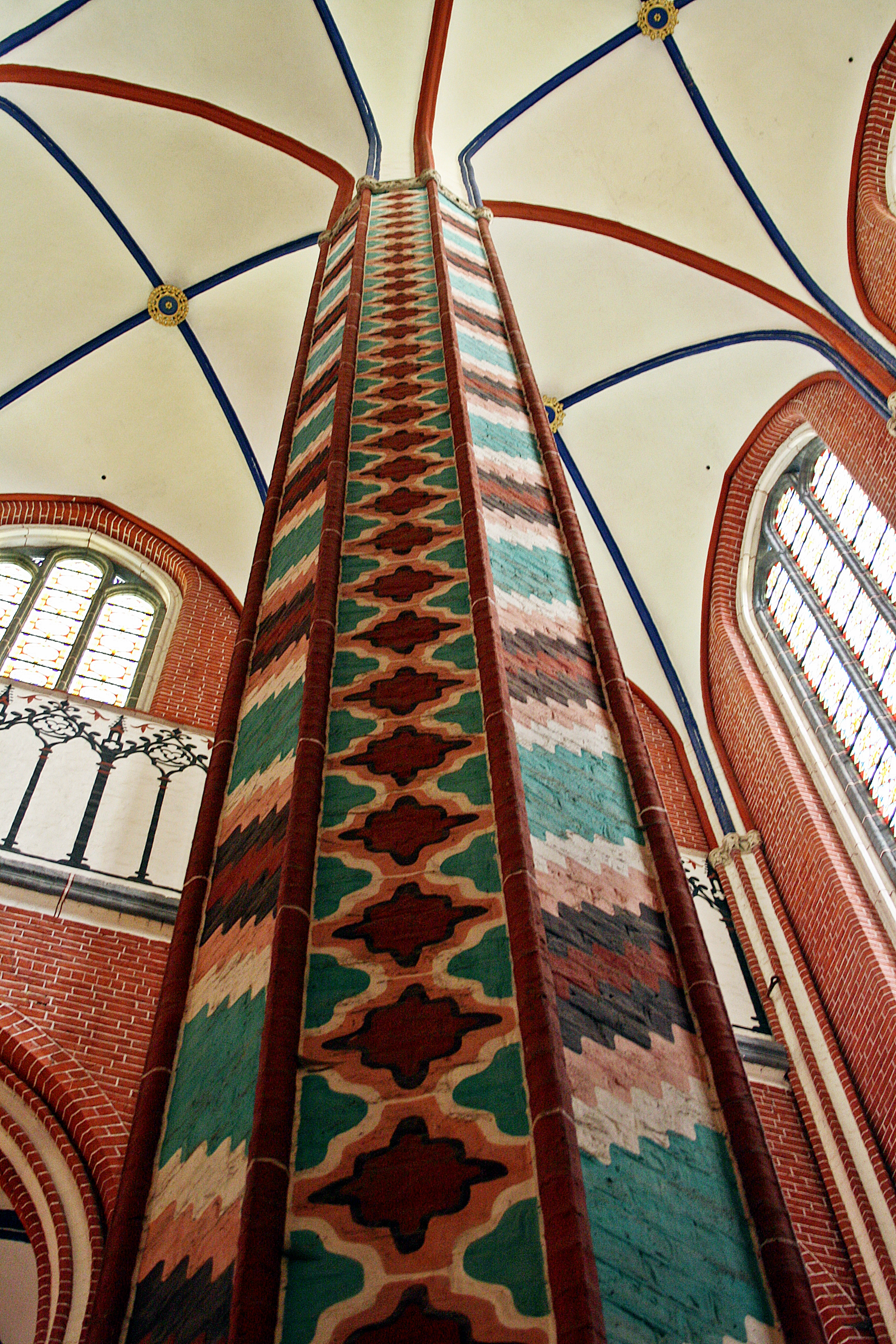 Bad Doberan, Münster, Gewölbetragende Säule